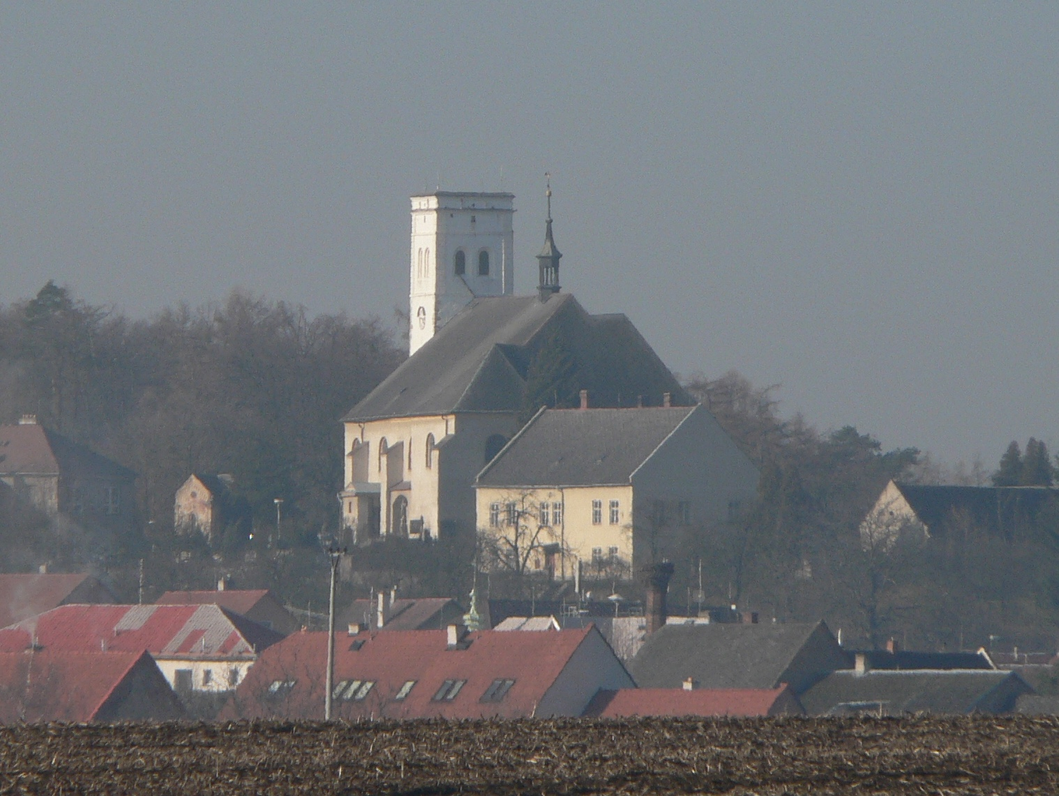 Kostel svatého Petra a Pavla (Medlov)